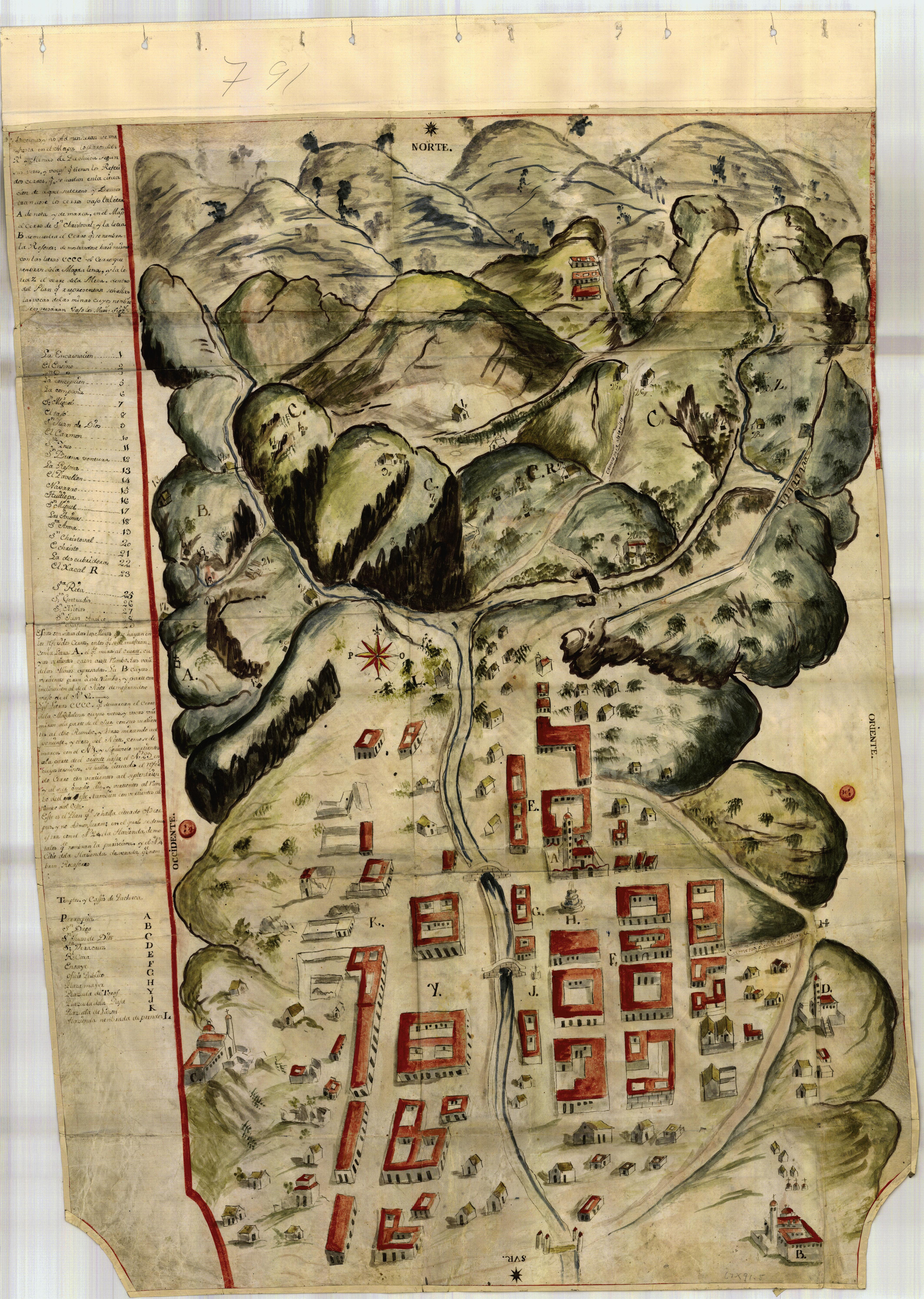 La fecha de composición de este mapa manuscrito (dada por la Mapoteca a la que pertenece; no figura en el mapa mismo) marca el resurgimiento de las minas de Pachuca, tras su decadencia en la primera mitad del siglo XVIII. La minería siempre fue muy cara y la quiebra era recurrente, sobre todo por las inundaciones y la dificultad de desagüar las vetas del mineral. En mayo 1739 el empresario José Alejandro Bustamante y Bustillos “denunció”, esto es, registró legalmente, “las minas contenidas en la nombrada Veta Vizcaína, sita en el Real del Monte, ofreciendo desagüarla y habilitarla, con tal que se le adjudicase y concediese”. Principalmente, obtendría “el uso, propiedad y beneficio de todas las vetas”, y que las justicias de la jurisdicción se encargaran de conseguirle los operarios. El virrey Juan Antonio Vizarrón se lo concedió. En 1741 Bustamante se asoció con Pedro Romero de Terreros, y juntos abrieron la contramina o socavón llamada Azoyatla. Aun así no se logró; tras nueve años desampararon ese socavón y determinaron abrir otros: N. S. de Guadalupe, Aranzazu, así como ahondar el tiro de Sta Teresa, La Joya y Sabanilla. Bustamante logró el establecimiento, con aprobación del virrey Revillagigedo, de una compañía de avío o crédito en agosto 1747; en 1749, ya sin recursos, buscaba extinguirla. Bustamante muere en 1750: “A su muerte la Veta Vizcaína fue adjudicada a don Pedro Romero de Terreros”, quien logró finalmente beneficiarla, abrió una época de oro de las minas de Pachuca y se convirtió en el hombre más rico de México en ese entonces (datos y citas de Velázquez).